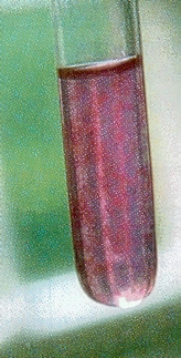 Niederschlag von Nickeldimethylglyoxim, Nachweisreaktion, Analytische Chemie